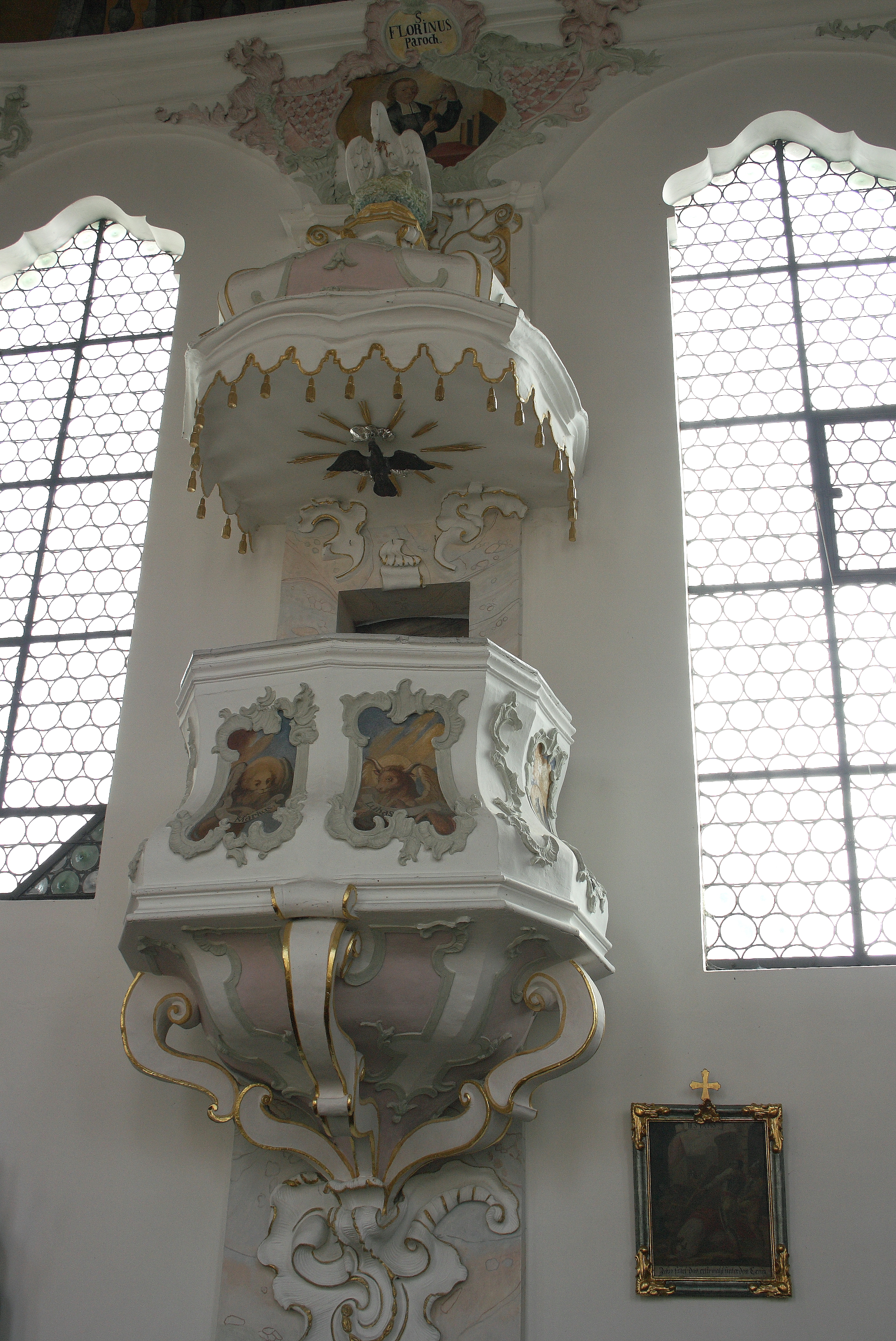 Katholische Pfarr- und Wallfahrtskirche Mariä Schmerzen in Waldkirch, einem Ortsteil von Winterbach (Schwaben) im Landkreis Günzburg (Bayern), Kanzel mit den Evangelistensymbolen und einem Pelikan auf dem Schalldeckel